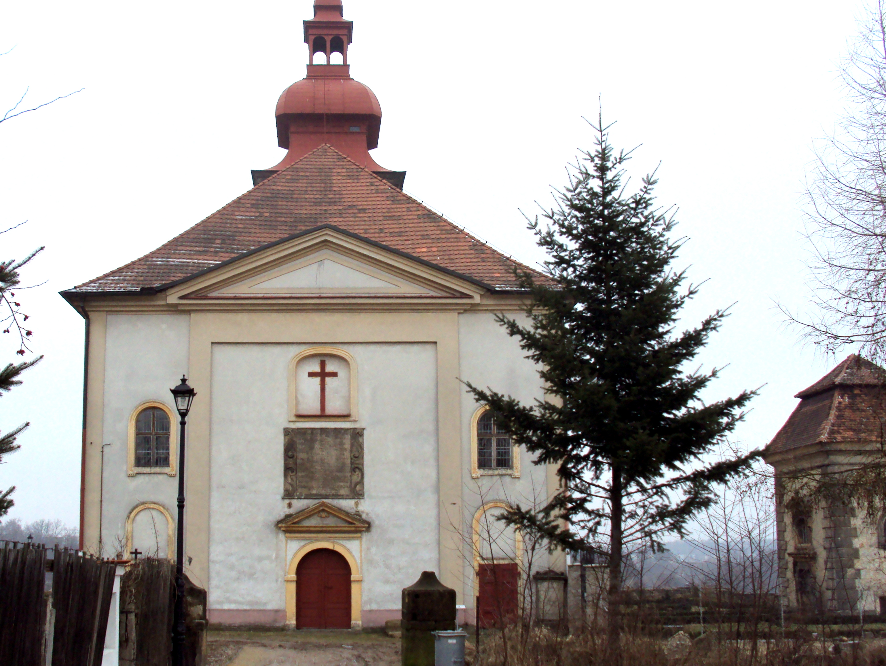 Kostel sv.Petra a Pavla v Mimoni, vchod